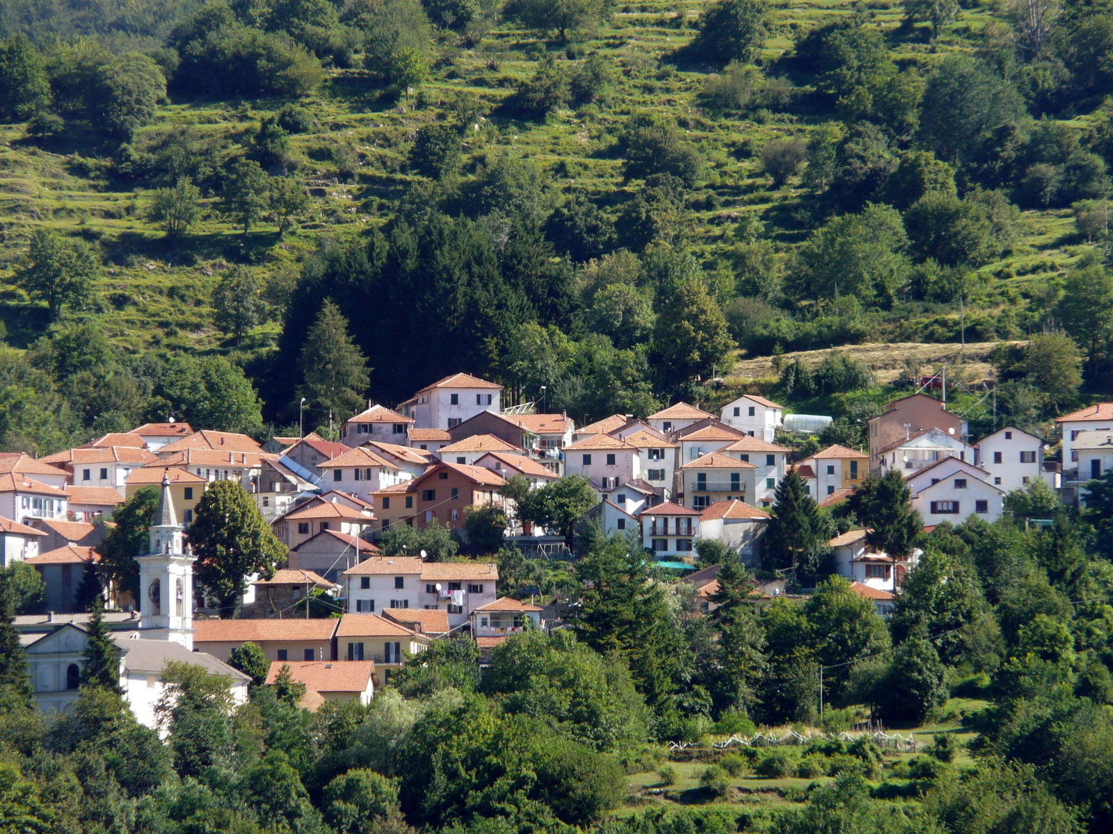 Propata, Liguria, Italia